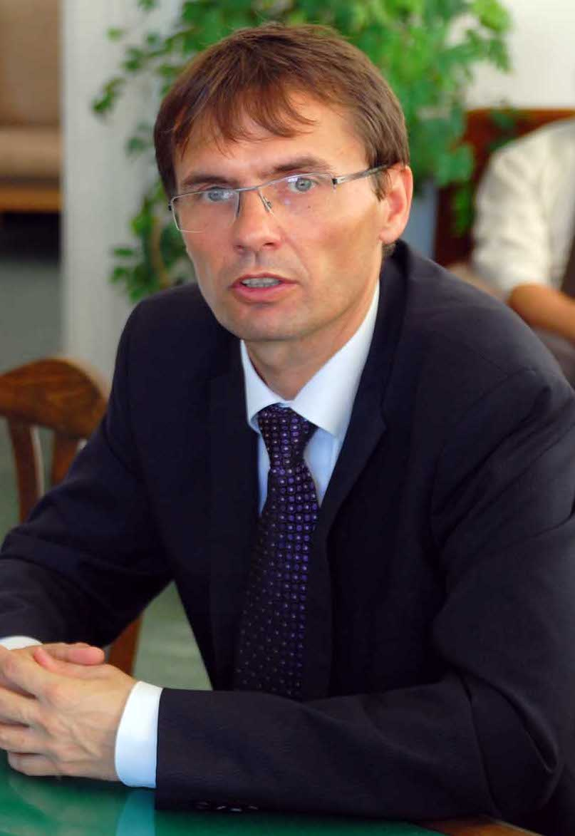 Ľubomír Galko